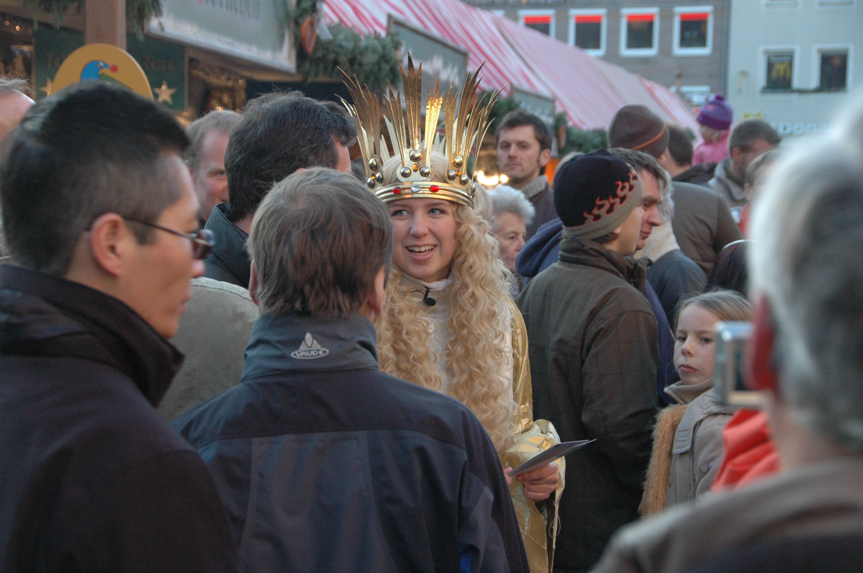 Rebekka Volland als Nürnberger Christkind